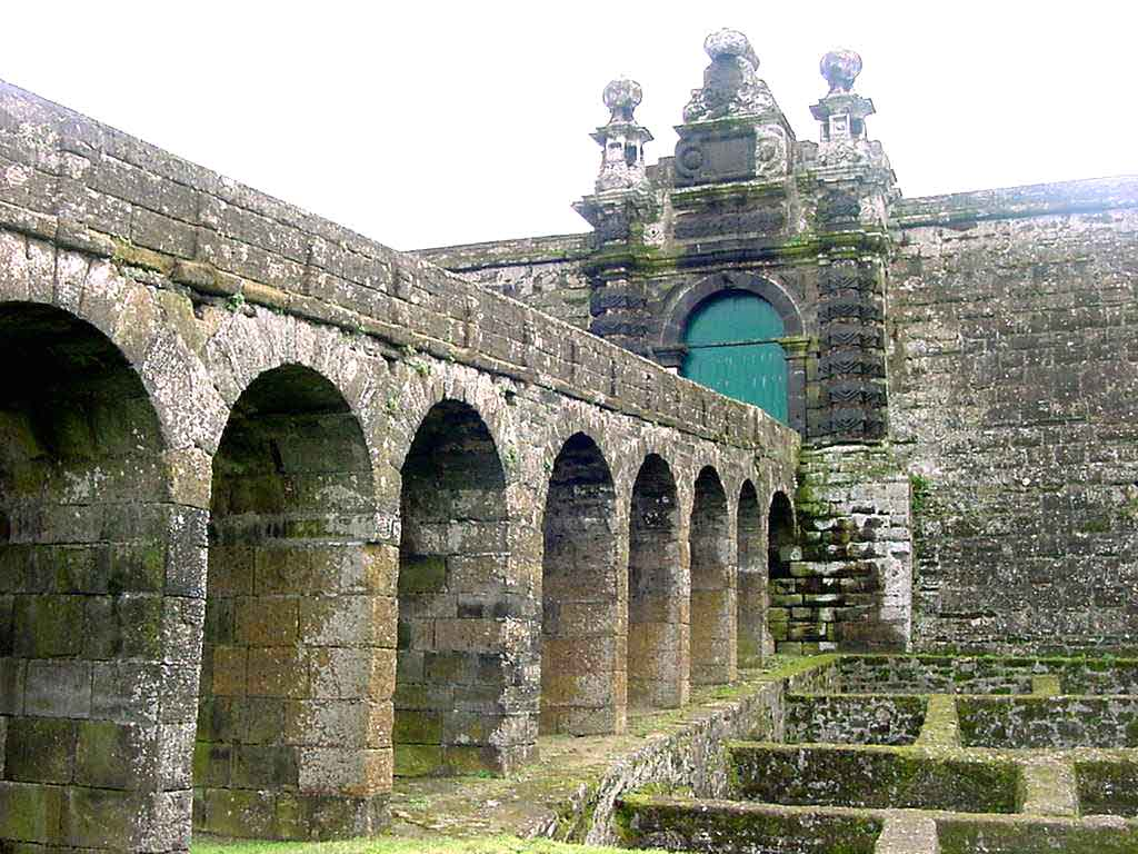 Fortaleza de São João Baptista do Monte Brasil, Angra do Heroísmo, ilha Terceira, Açores: vista da ponte de acesso ao Portão de Armas.